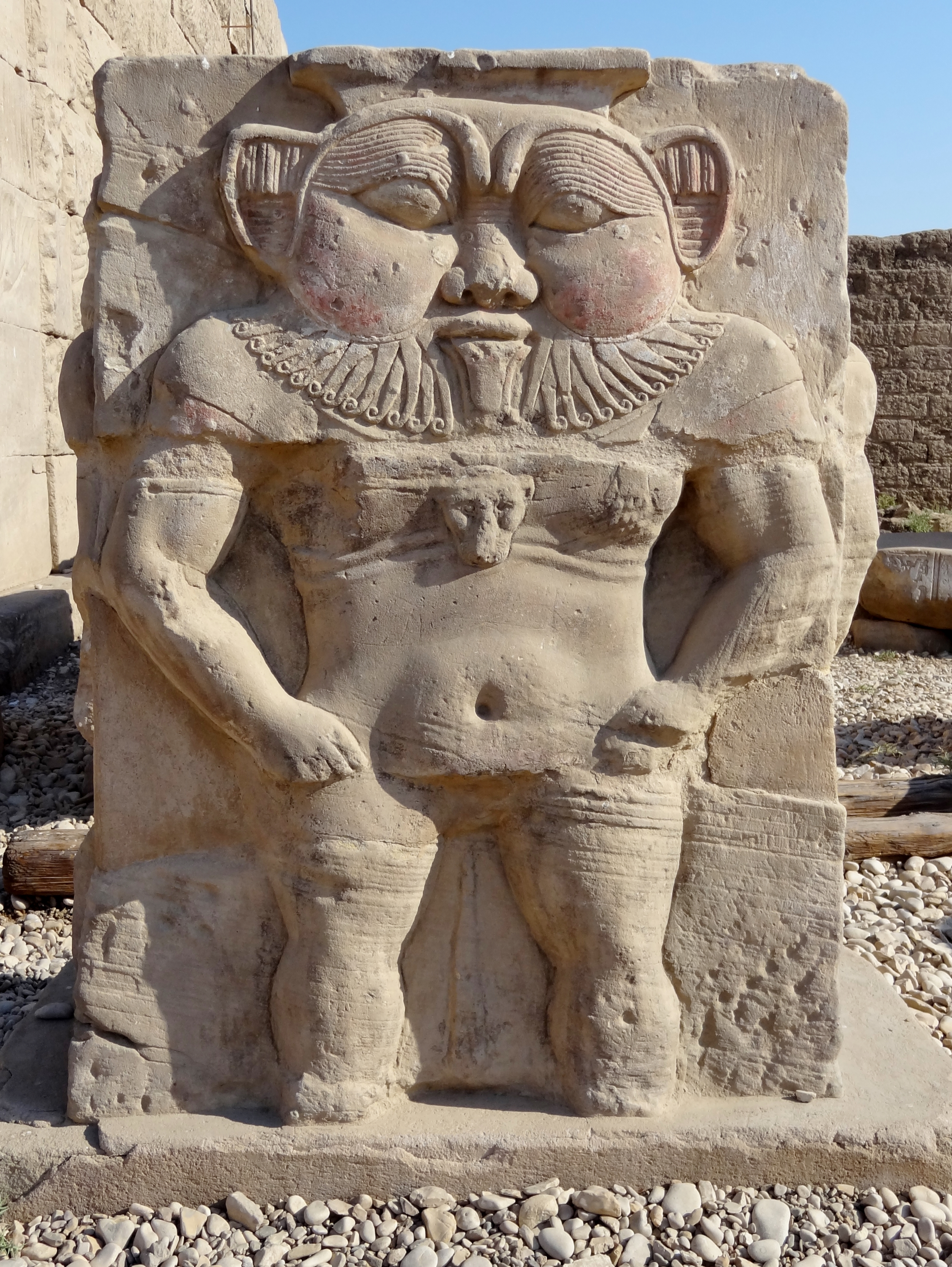 Relief des Gottes Bes neben dem römischen Nordtor des Tempelkomplexes von Dendera, Ägypten